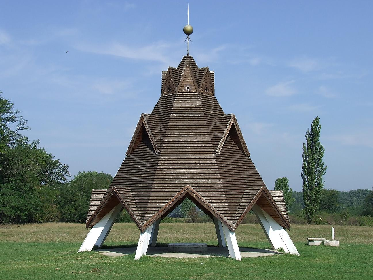 Pusztavacs mellett Magyarország földrajzi középpontja